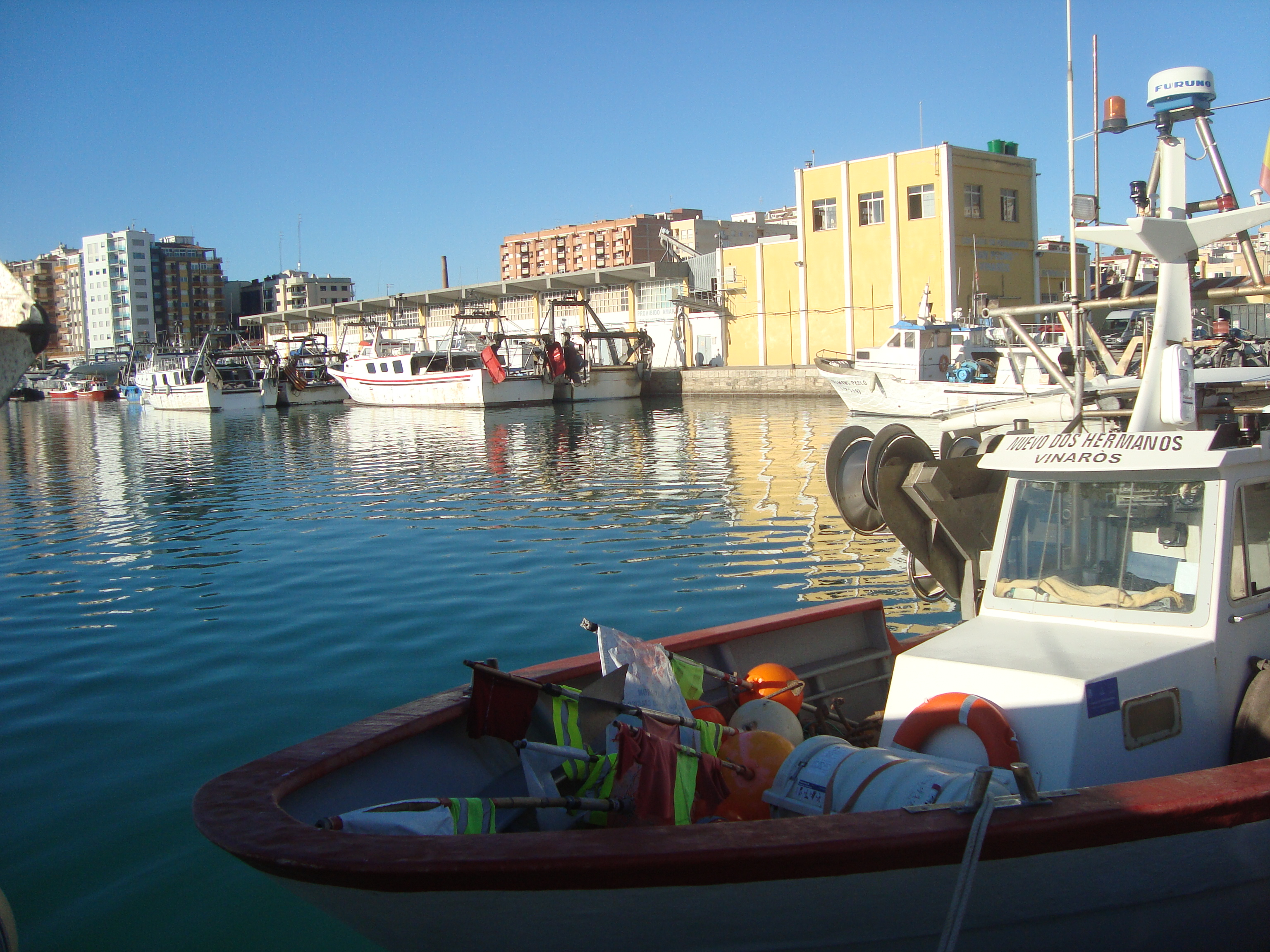 Port de Vinaròs. 03.138-031.